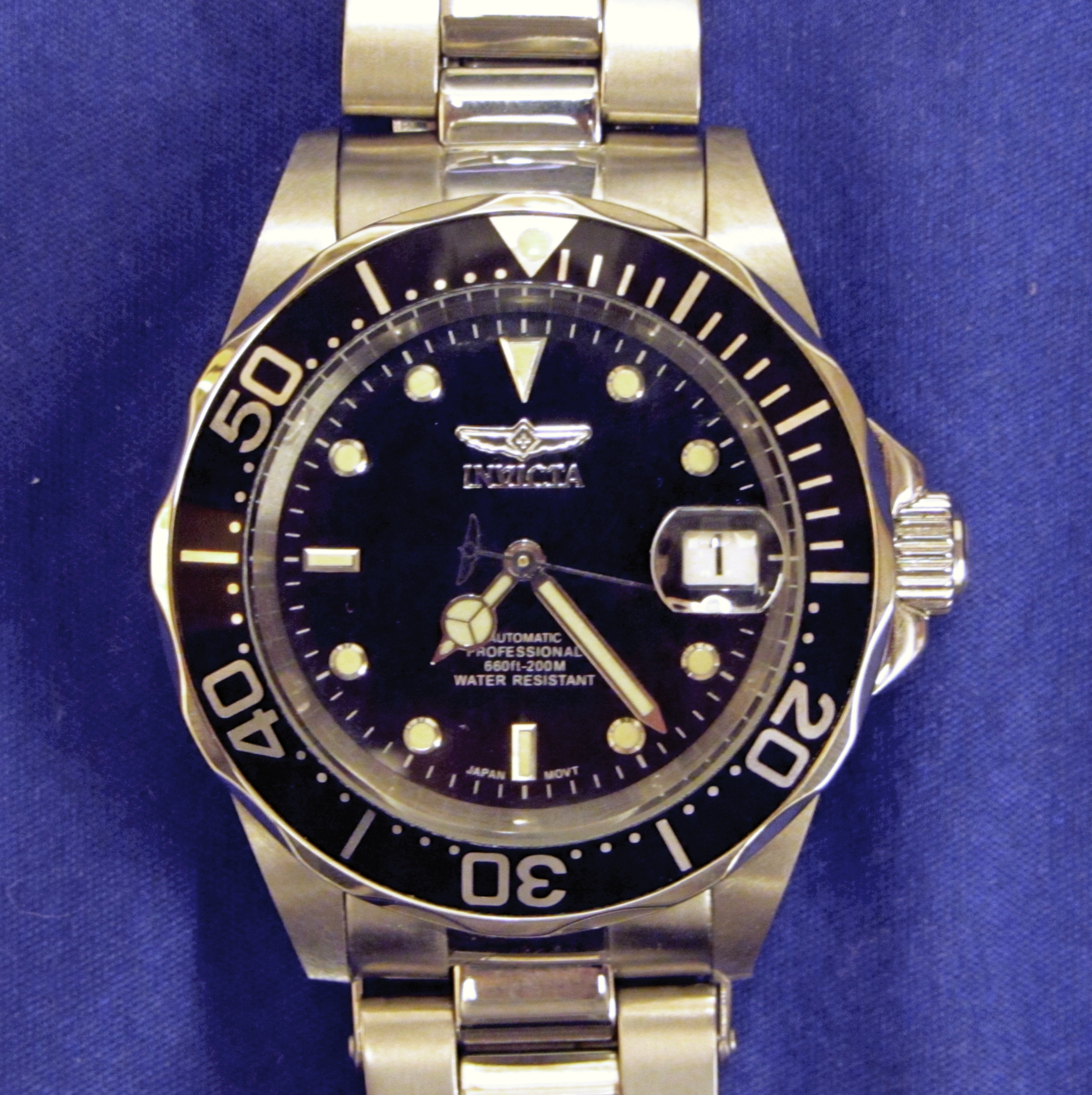 Invicta Herren-Automatikuhr „Pro DiverWatch_8926“, Taucheruhr bis 200m.